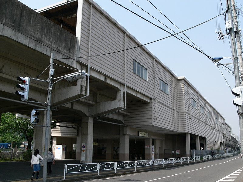 Keio railway Naganuma stationja:長沼駅 (東京都).